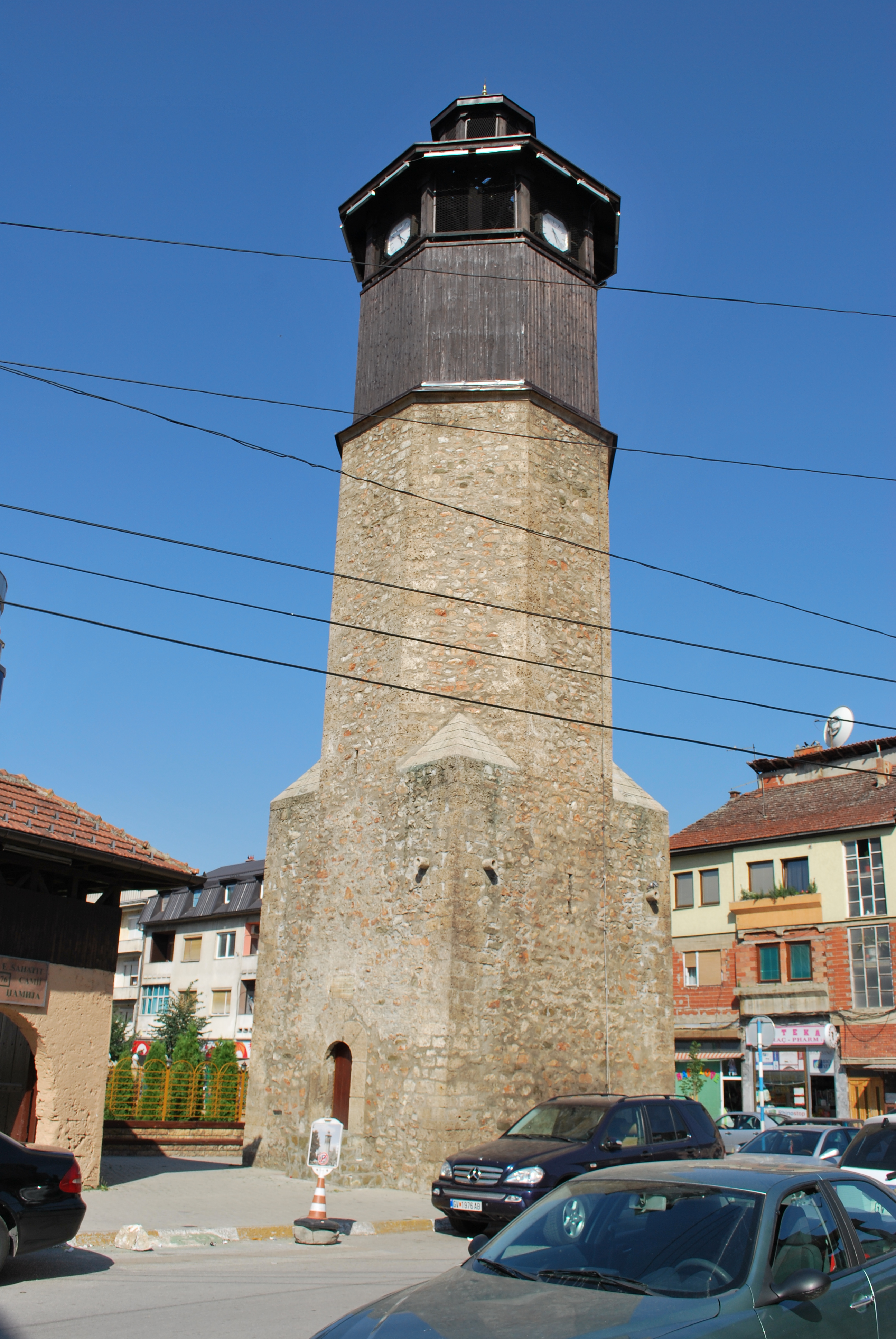 Саат кулата во Гостивар